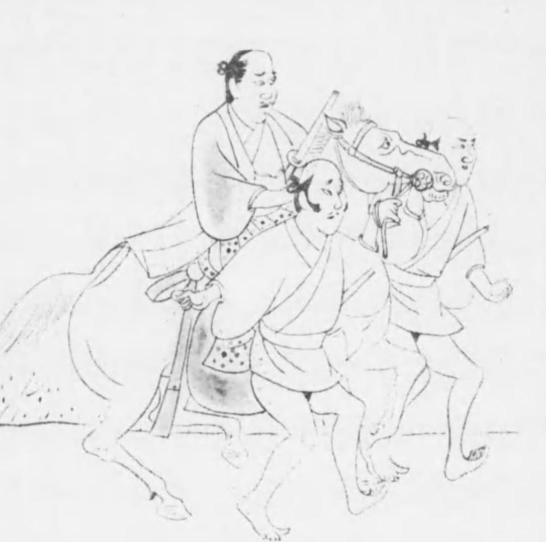 有馬晴信の木像。